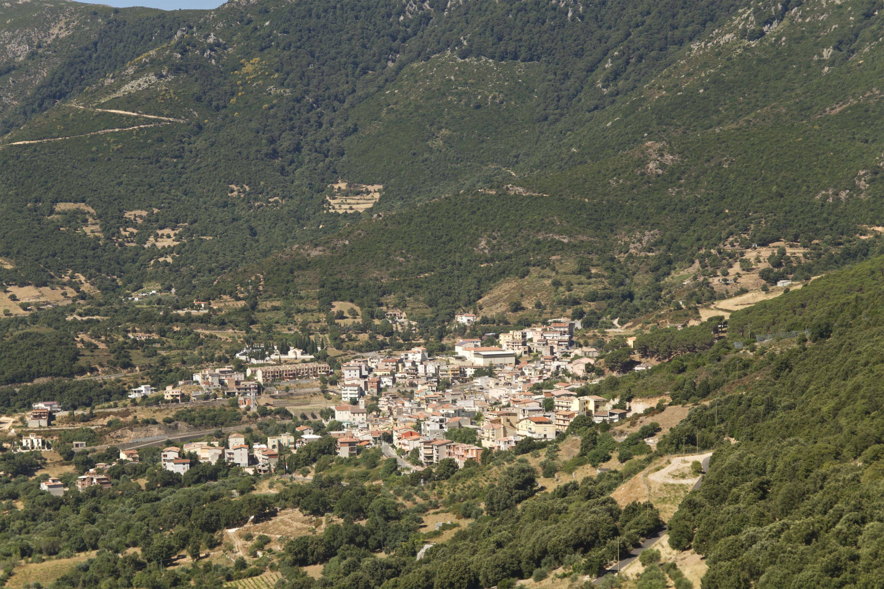 Urzulei